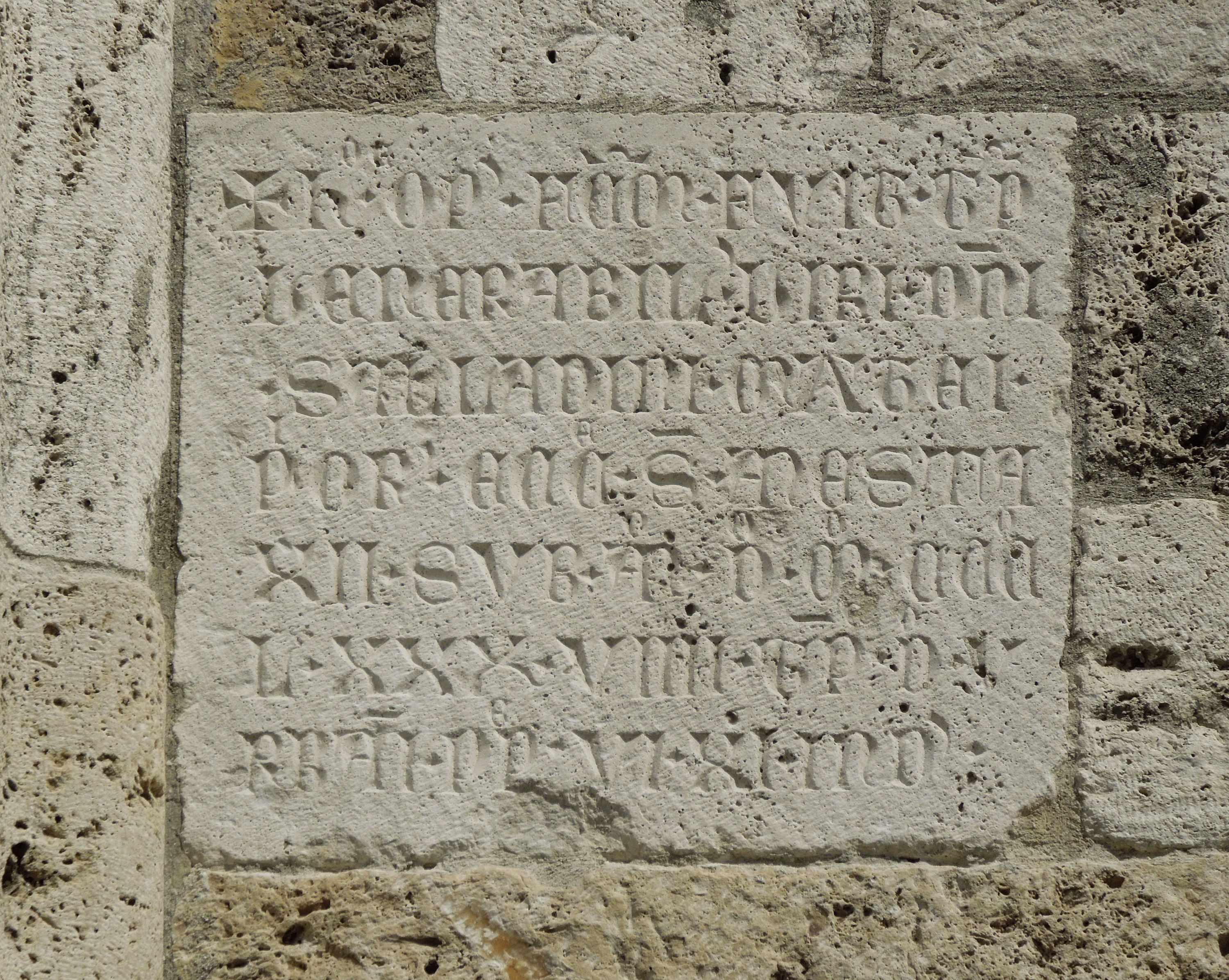 Supporto lapideo con l'incisione dell'epigrafe datata 1389 della chiesa dei Santi Vincenzo e Anastasio di Ascoli Piceno.